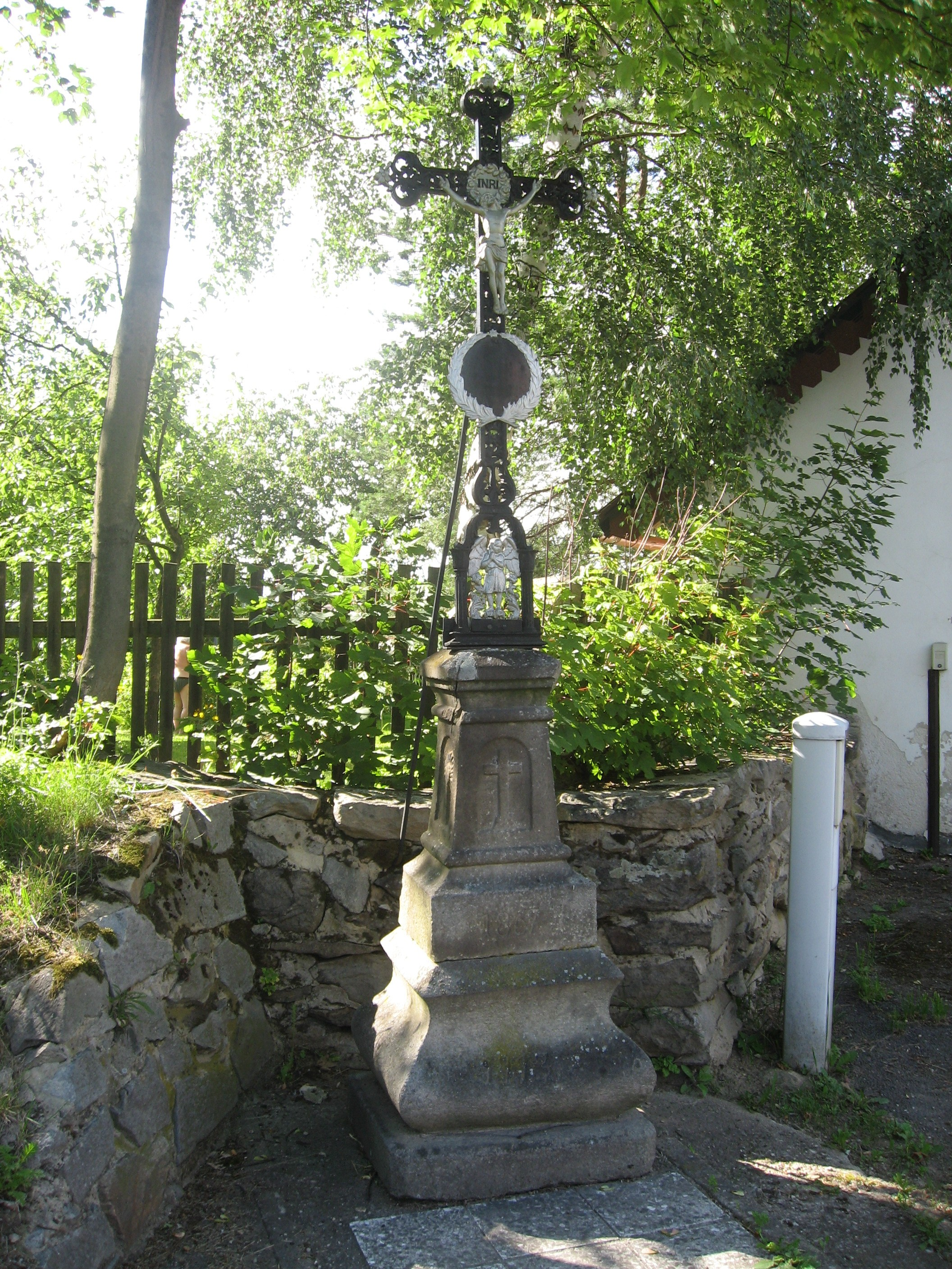 Zbinohy, kříž